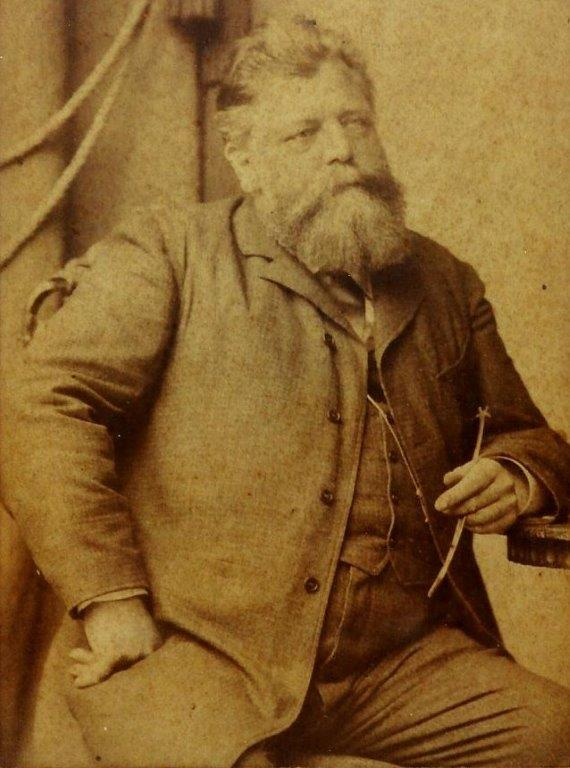 Fotografiert in Berlin etwa 1890(?)